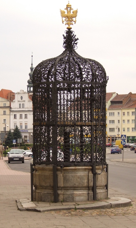 Piękna Studnia